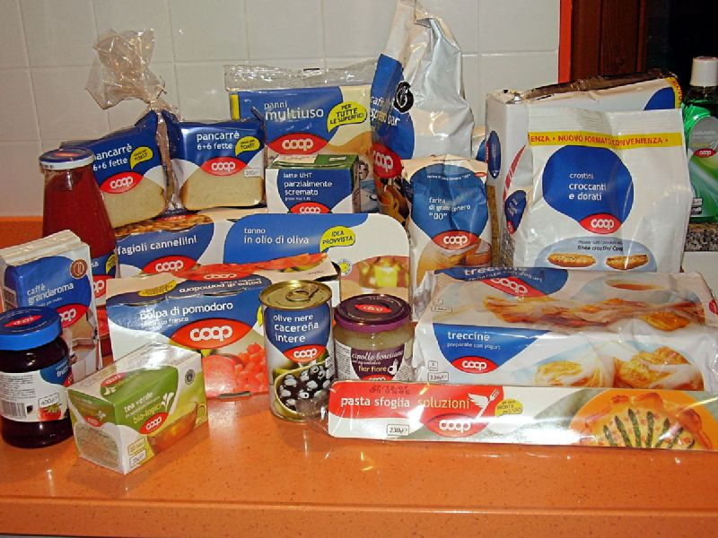 La COOP sei tu!